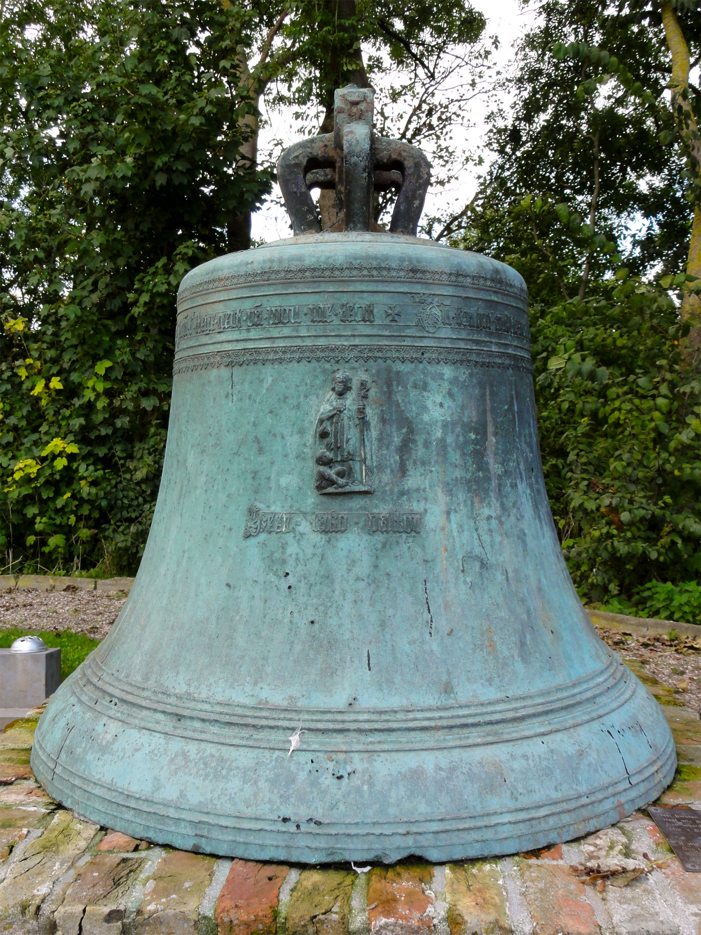 Klok van de Nicolaaskerk van Hantum met afbeelding van Sint-Nicolaas, rijksmonument